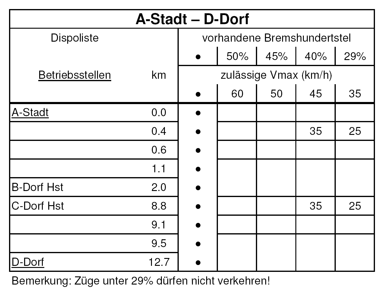 Auszug aus einer fiktiven Dispoliste der ÖBB